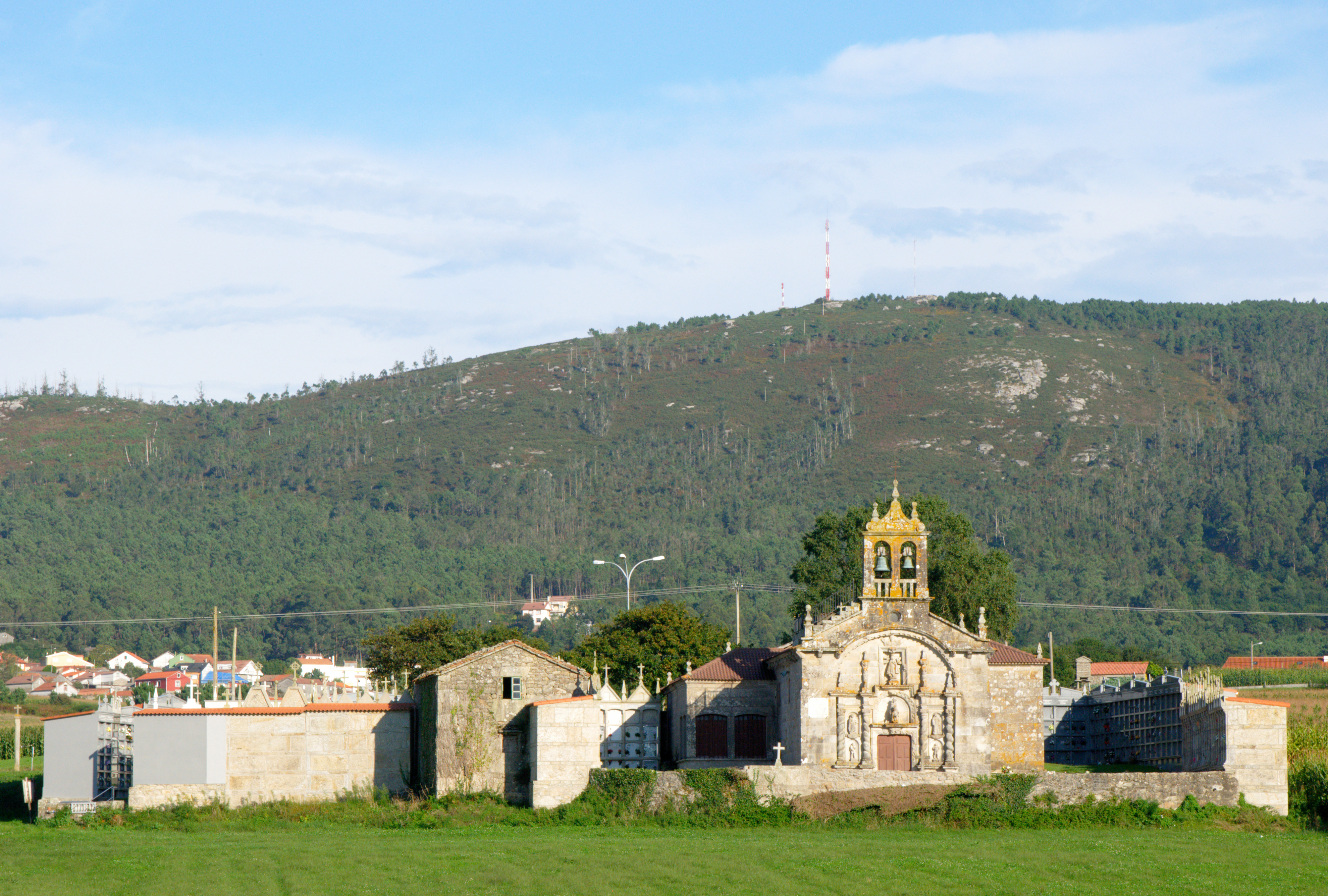 Laxe, iglesia de Santiago de Traba